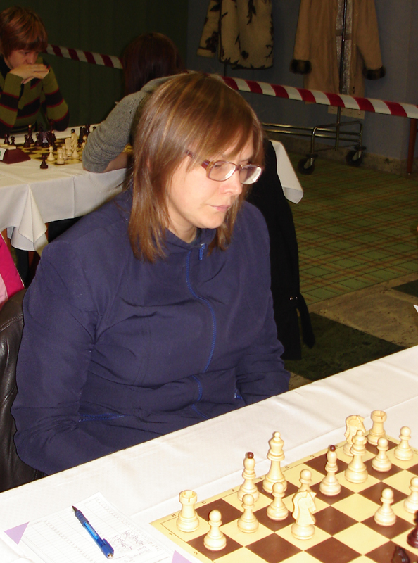 Svetlana Prudnikova, Russian Chess Woman Grand Master